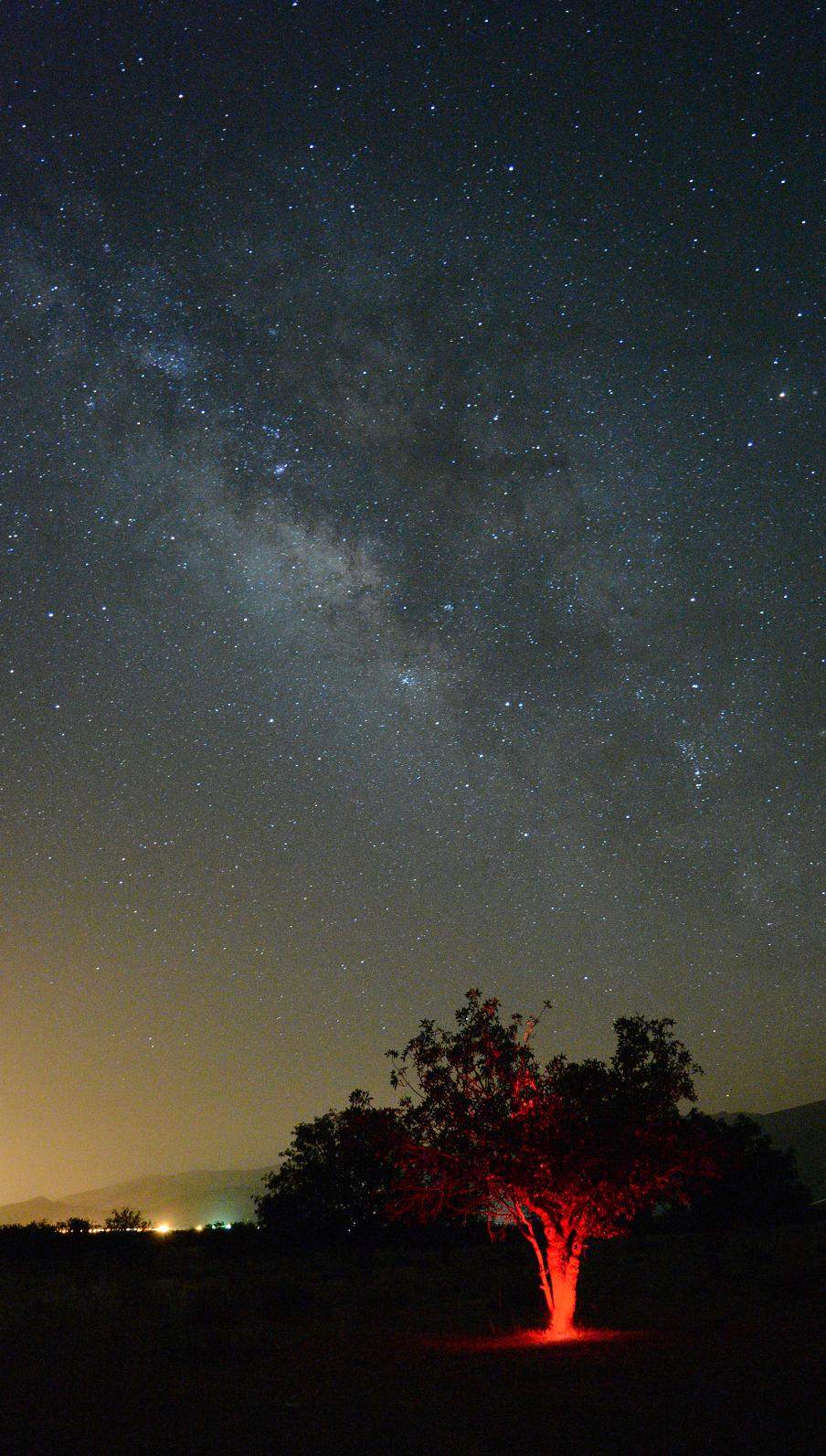 iran - fars - arsenjan